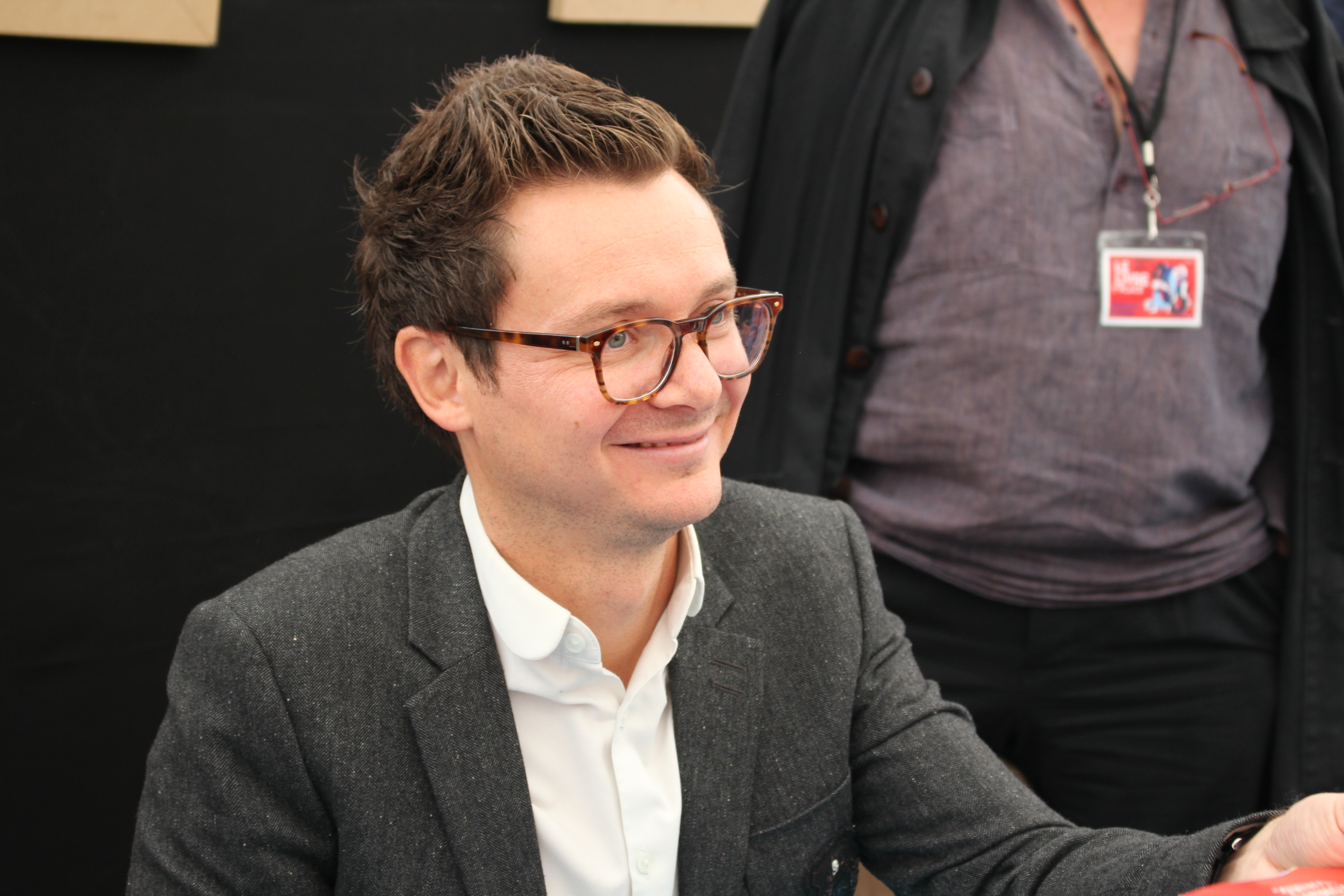 Julien Sandrel - Le Livre sur la Place 2018